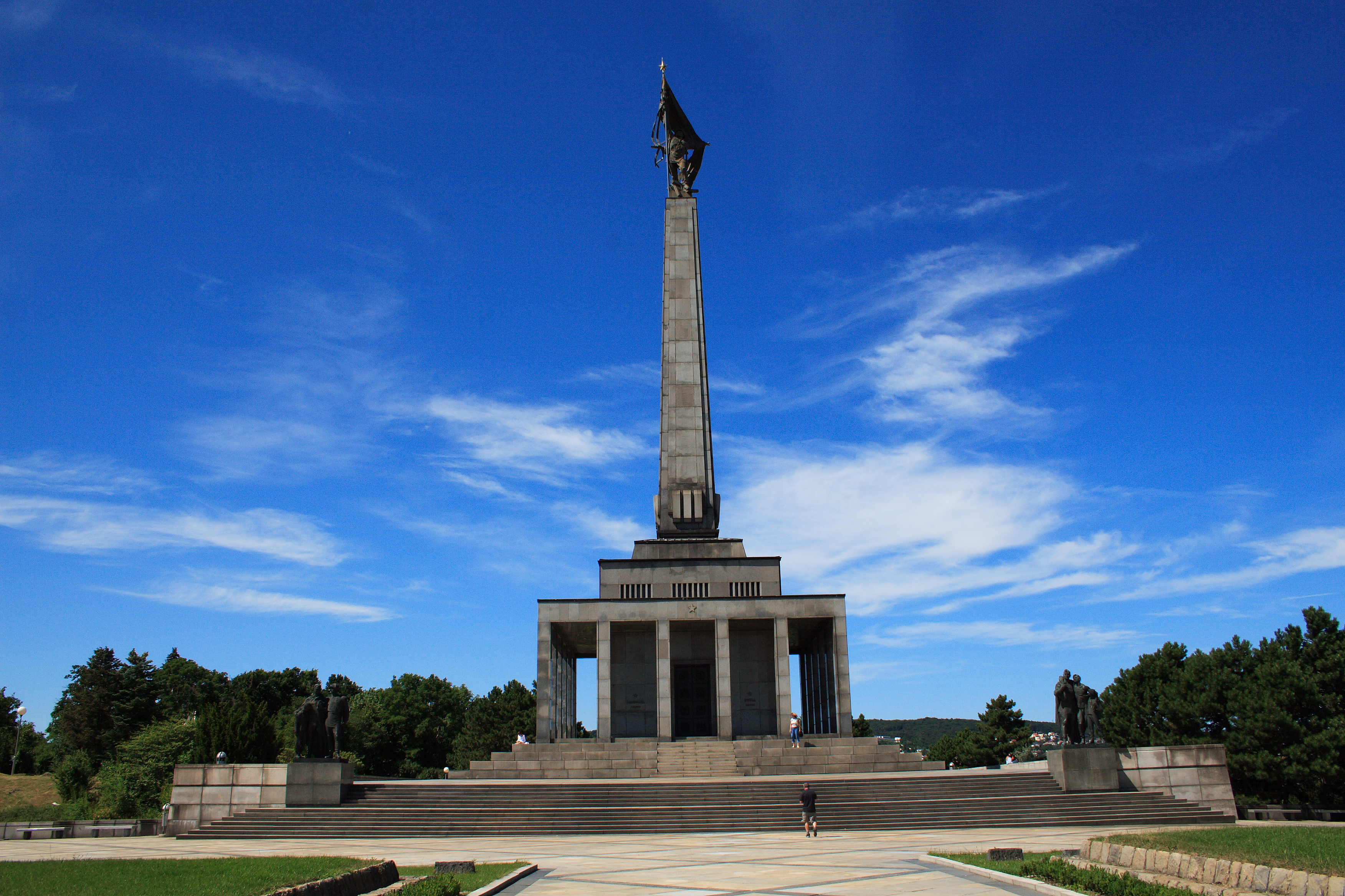 Slavín memorial